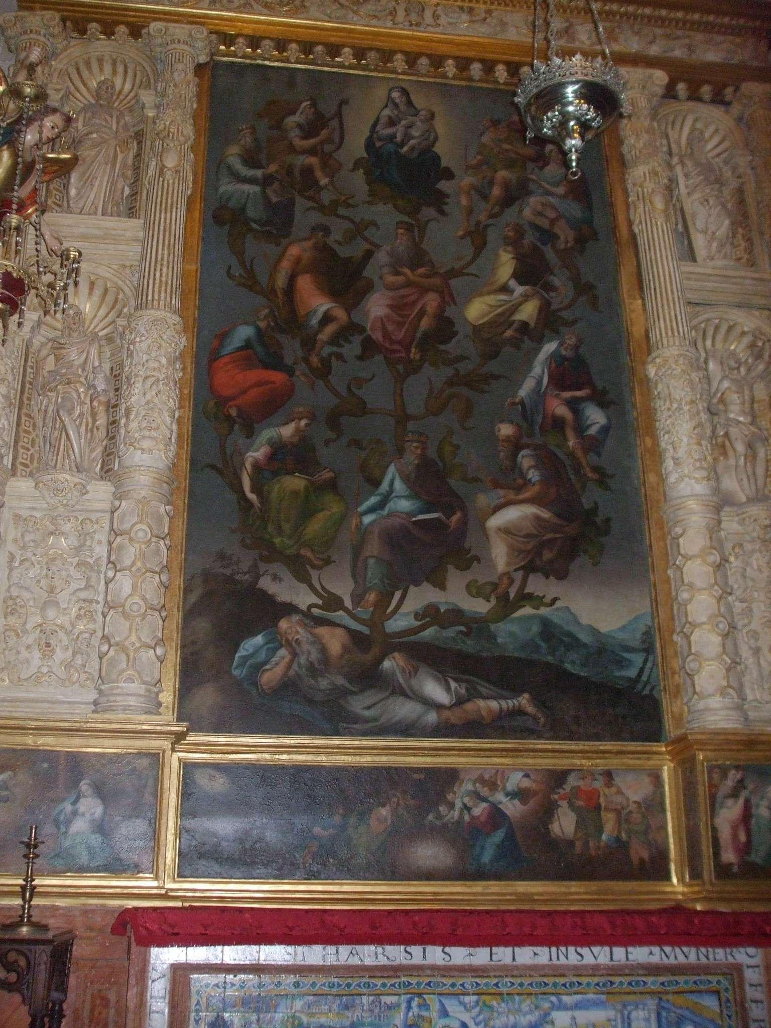 Capilla de la Natividad de Nuestra Señora de la Mezquita-catedral de Córdoba, (España).